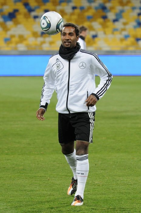 Украина - Германия. Накануне.